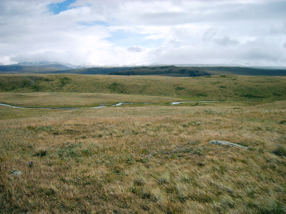 Плосокогорье Укок